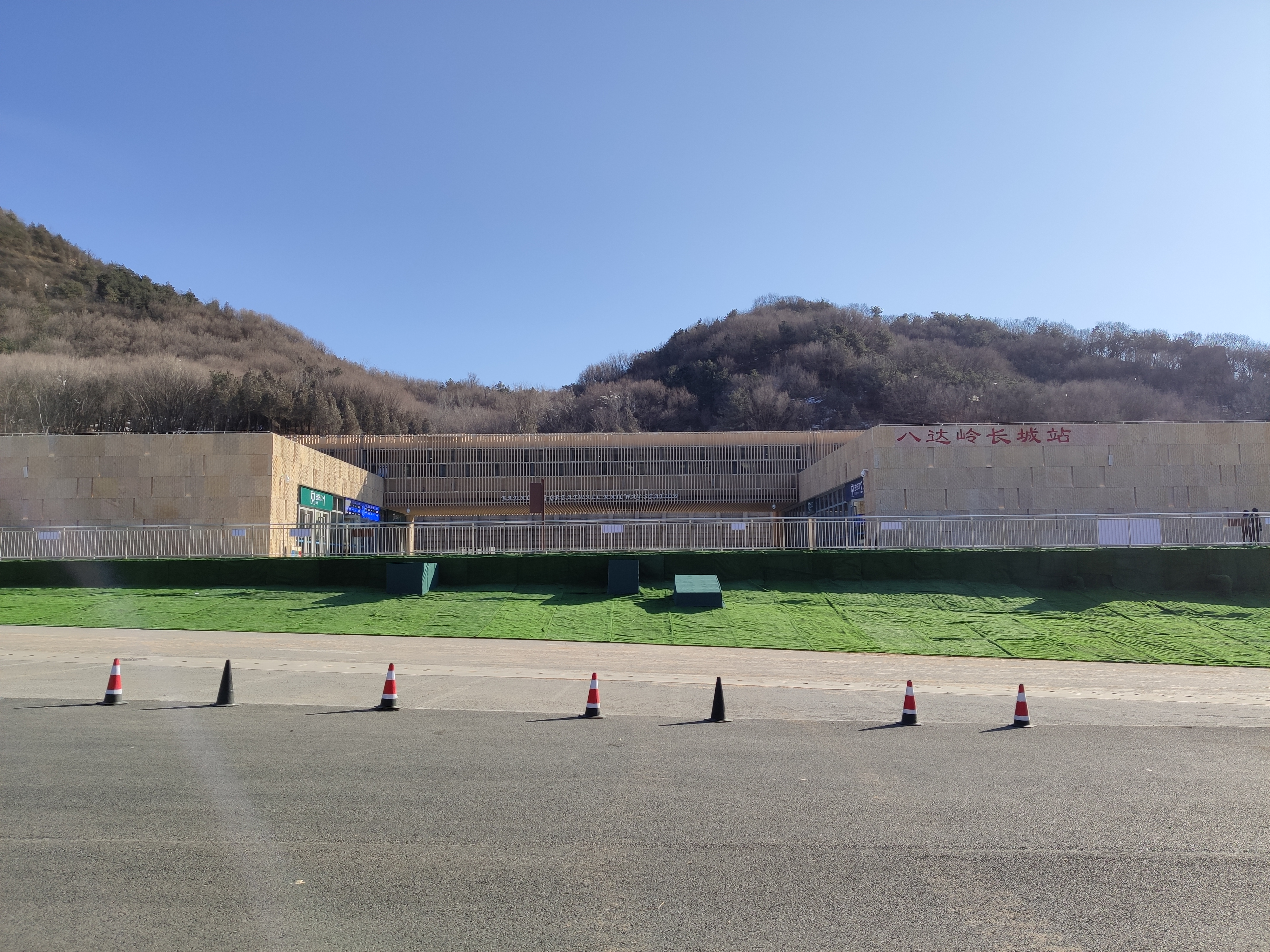 新开通的八达岭长城站